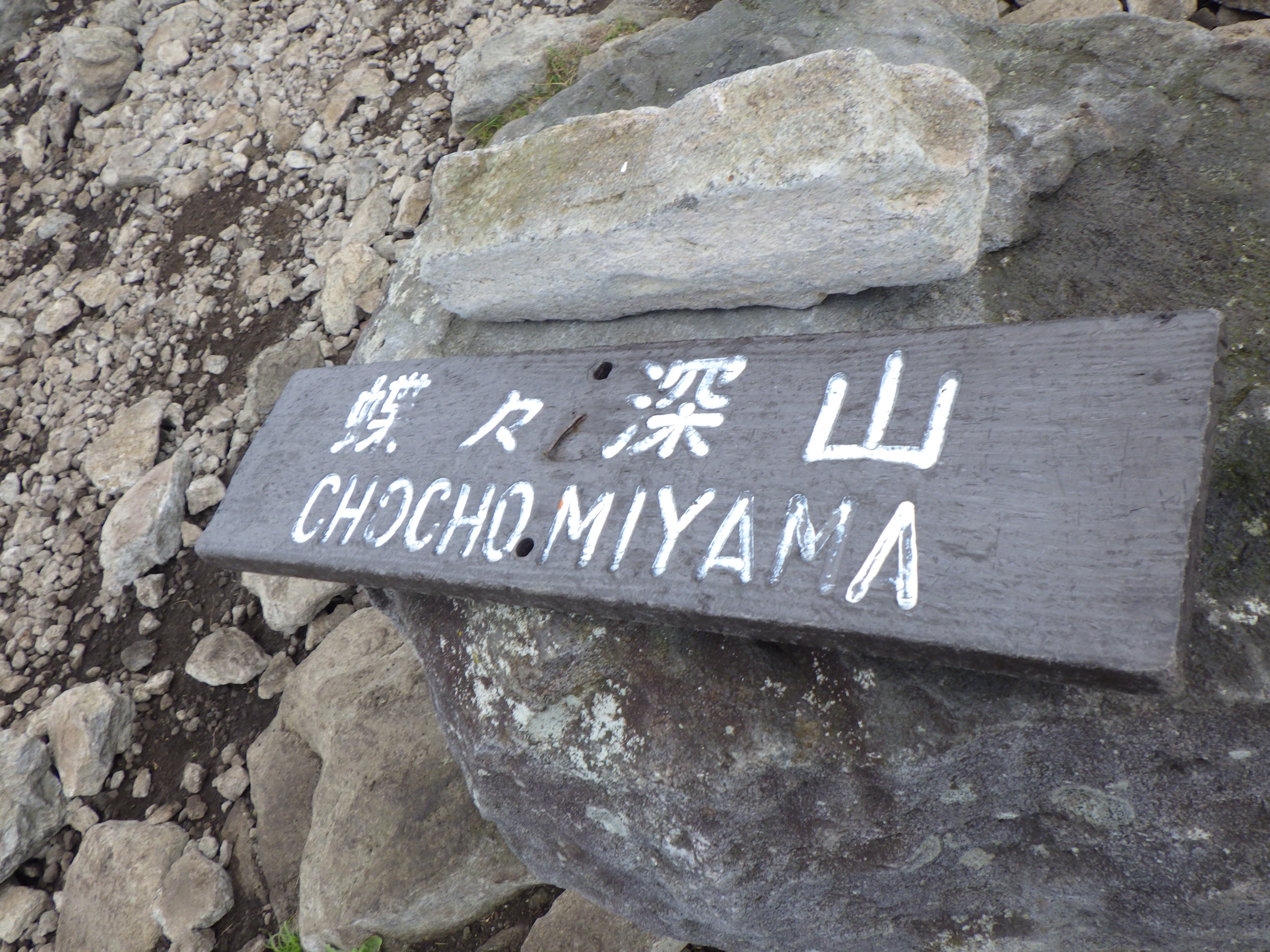 蝶々深山